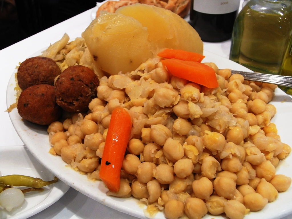 Verduras y legumbres utilizadas para hacer cocido madrileño.